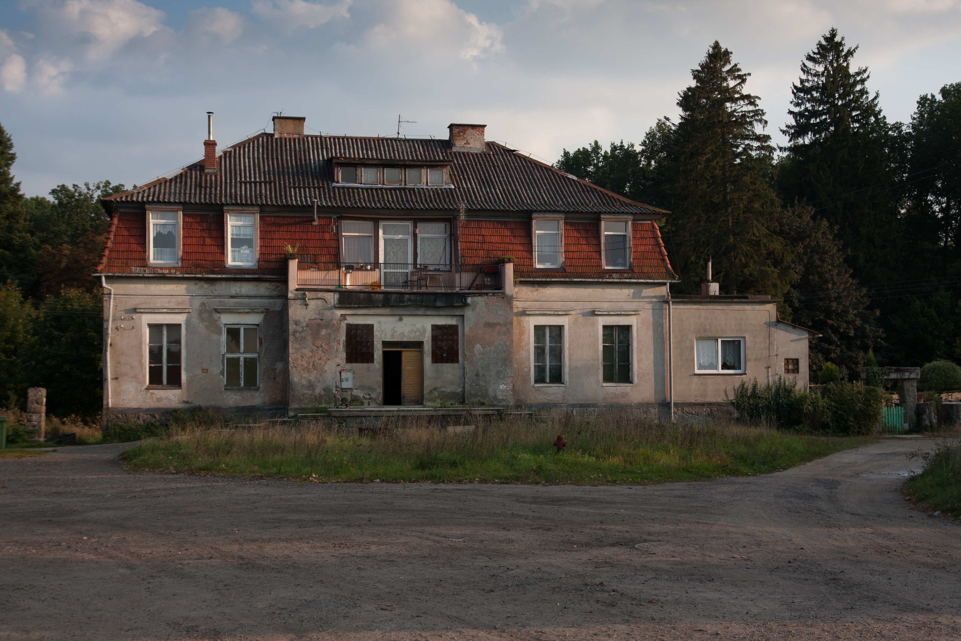 Miłocice, dwór, 1910-1911